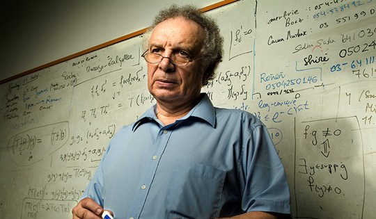 פרופסור למתמטיקה ויטלי מילמן